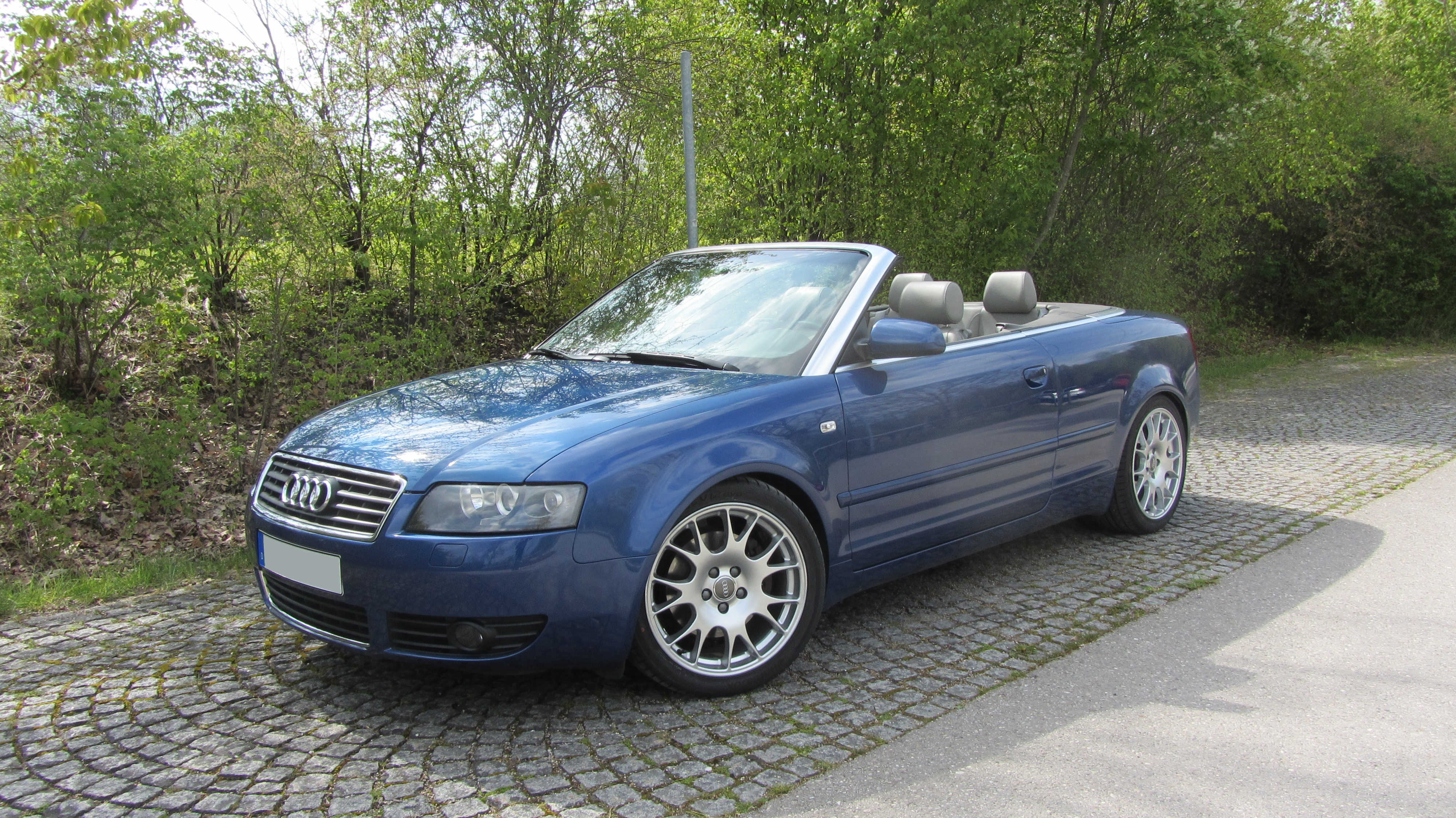 Front Audi A4 Cabriolet B6 8H Caribicblau Perleffekt Perlnappa Leder Hellgrau